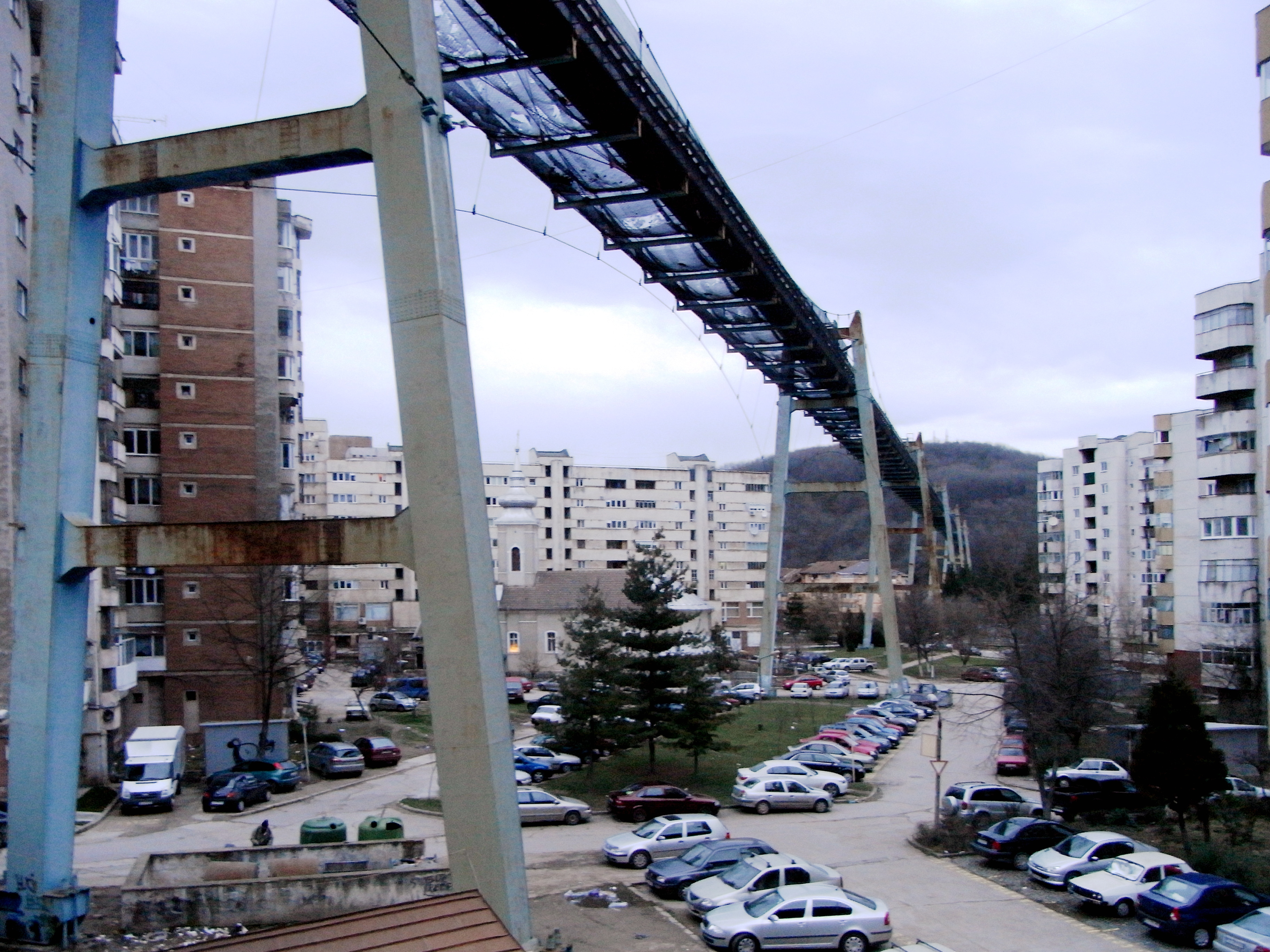 Die Reschitzer Materialseilbahn von unten, von Süden her gesehen.